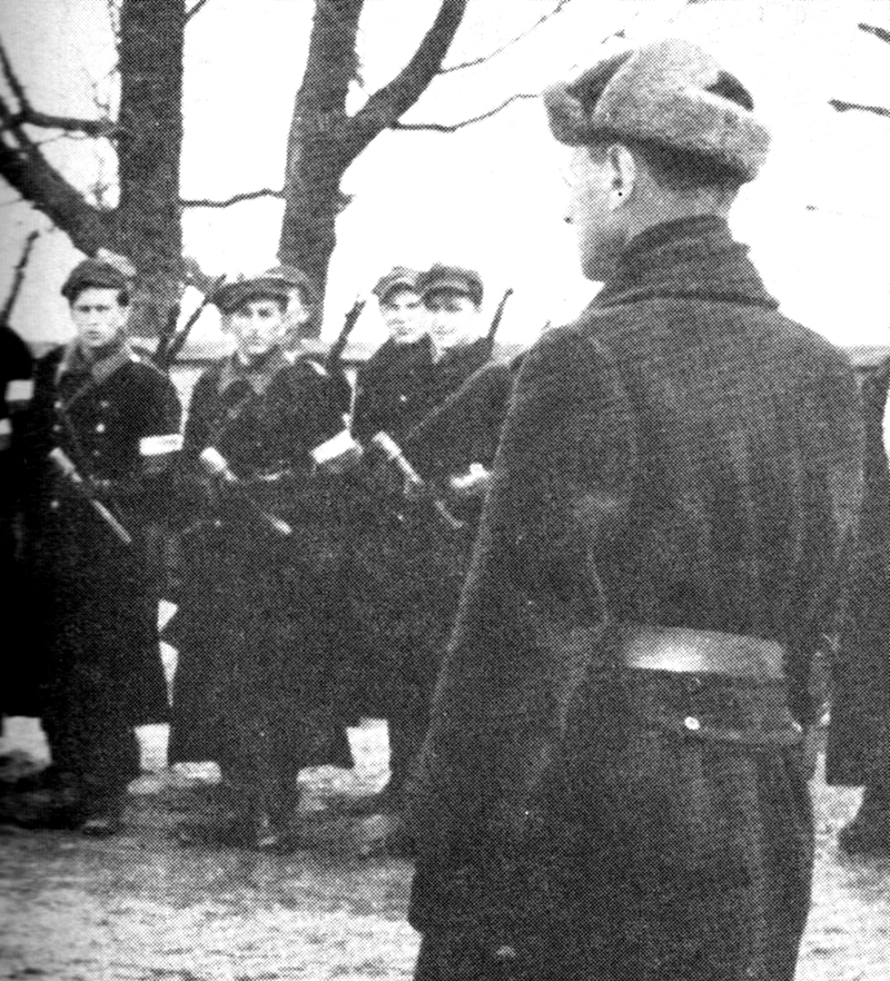 Generał Krzyżanowski "Wilk" CO of Polish Home Army in Lithuania